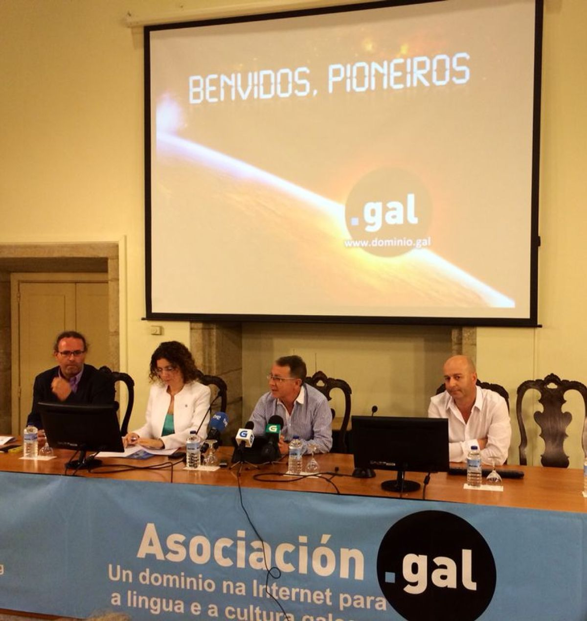 Presentación das primeiras 93 webs que empregarán o dominio .gal no Museo do Pobo Galego.